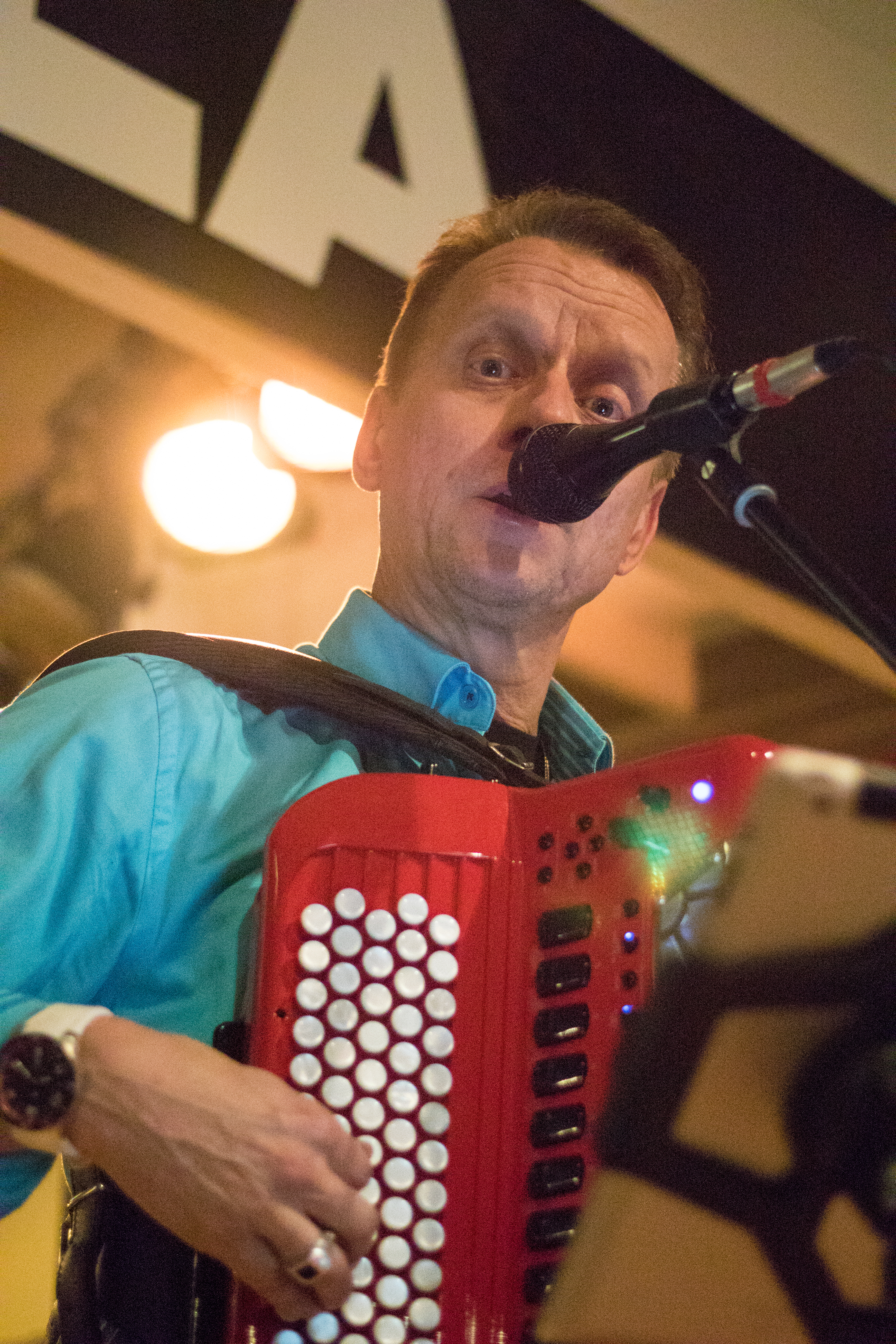 Harri Nuutinen suomalainen haitaristi